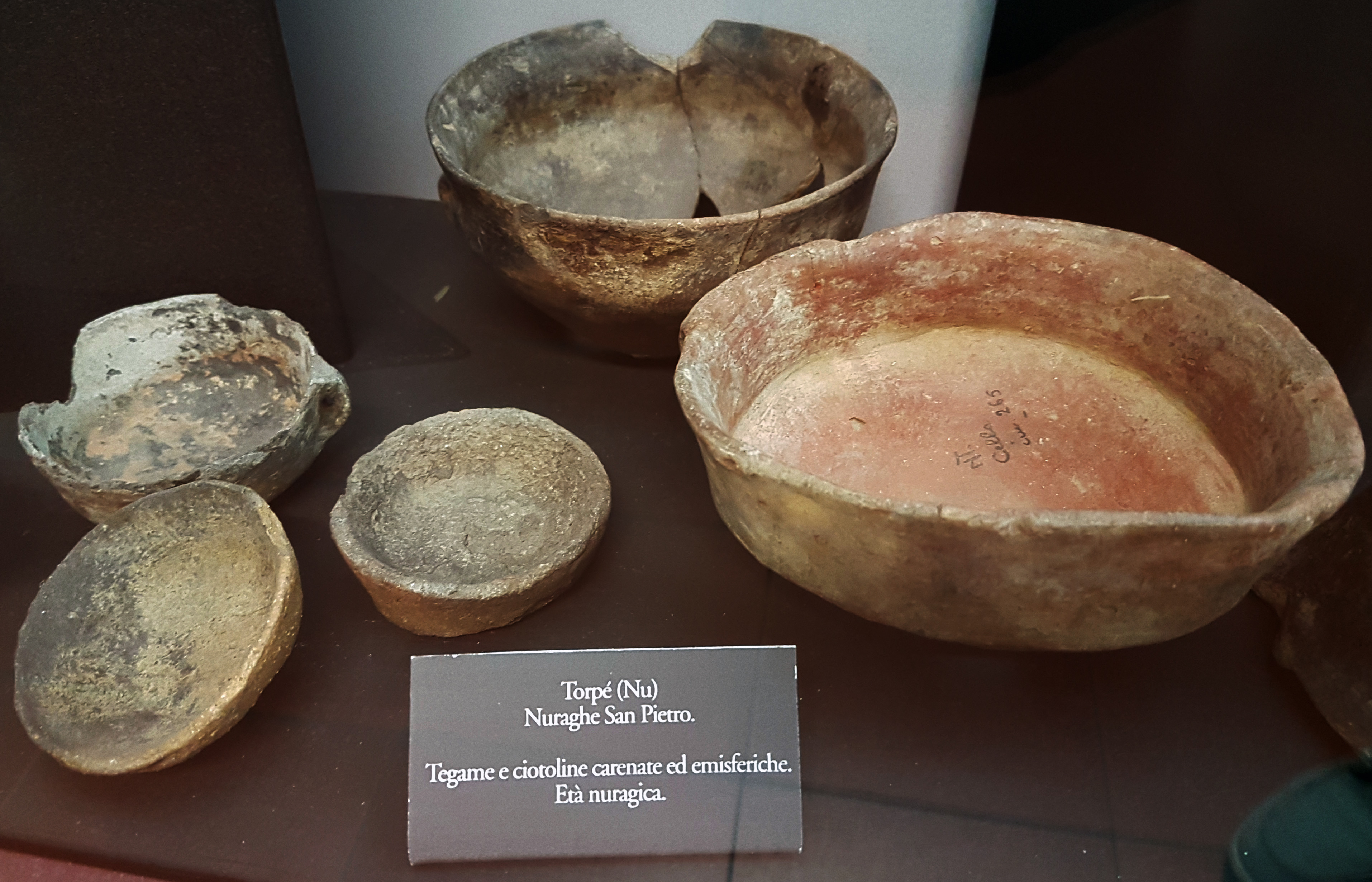 Tegame e ciotoline carenate ed emisferiche di età nuragica